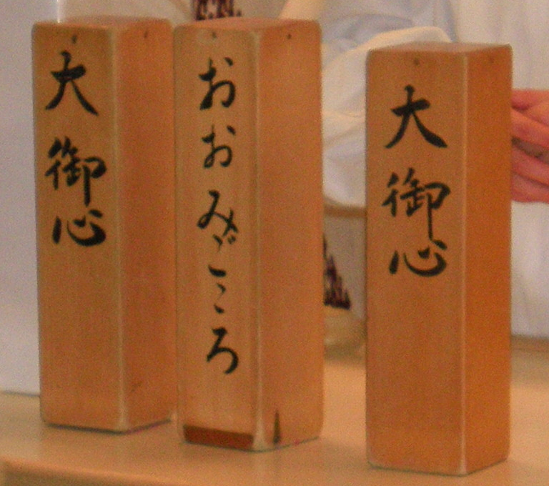 Omikuji boxes at Meiji Shrine.